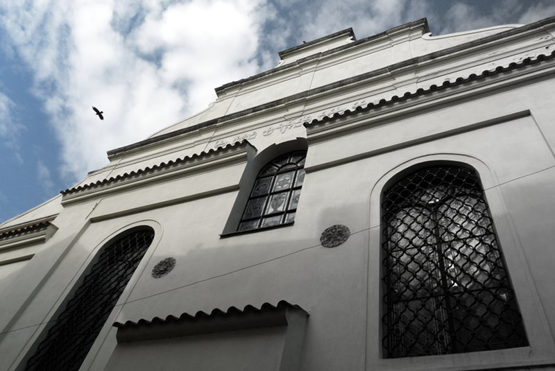 Průčelí kolínské synagogy, viditelné pouze při přímé návštěvě místa. Tato stavba je mimo Prahu nejstarší a nejcennější památka svého druhu v Čechách a také největší synagoga zde vzniklá do 18. století.